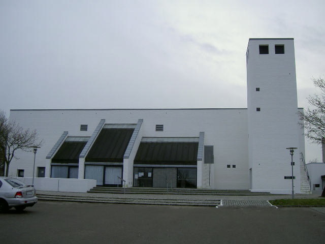 Ellevang Kirke from north